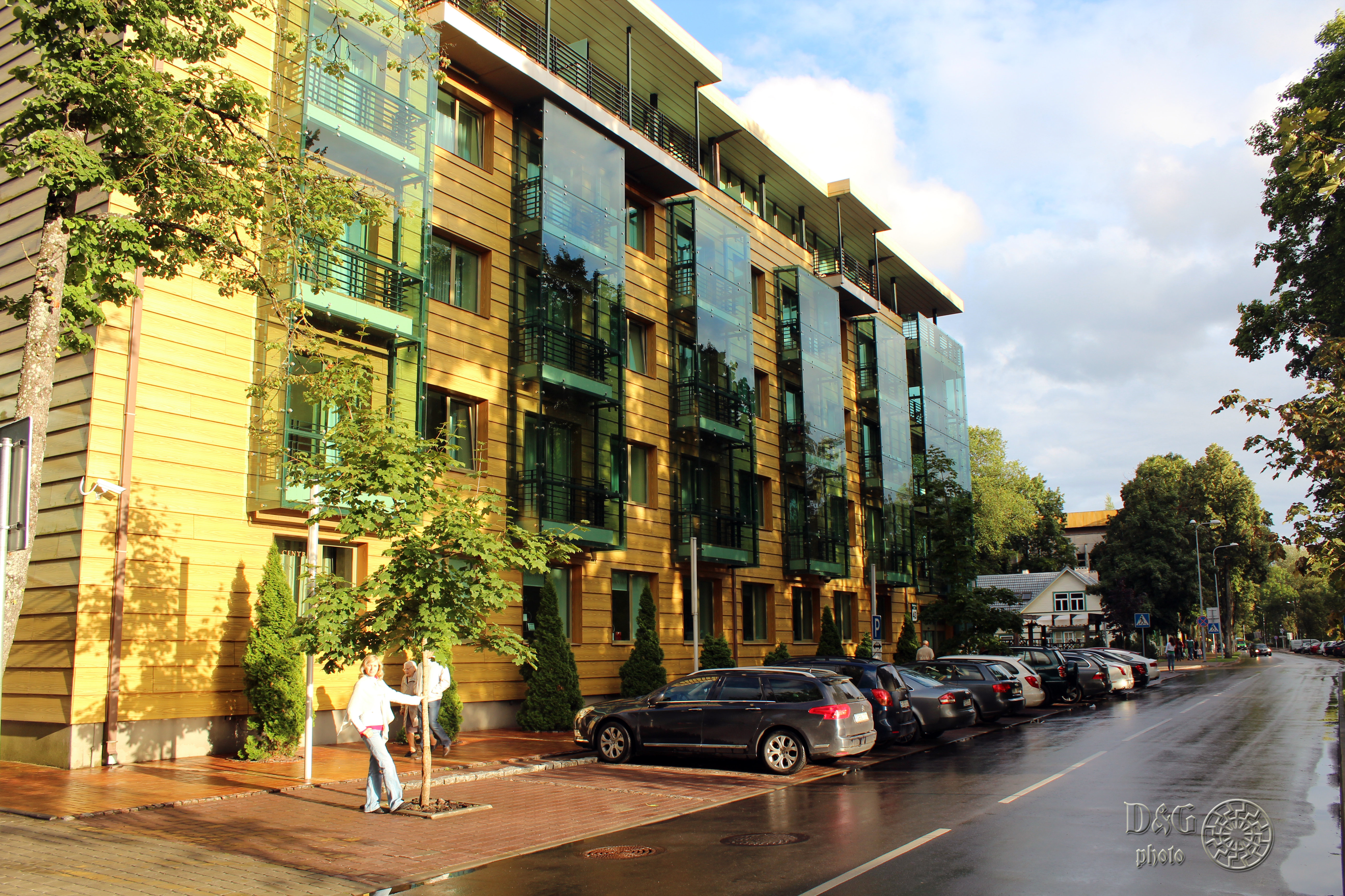 Luxury Druskininkai